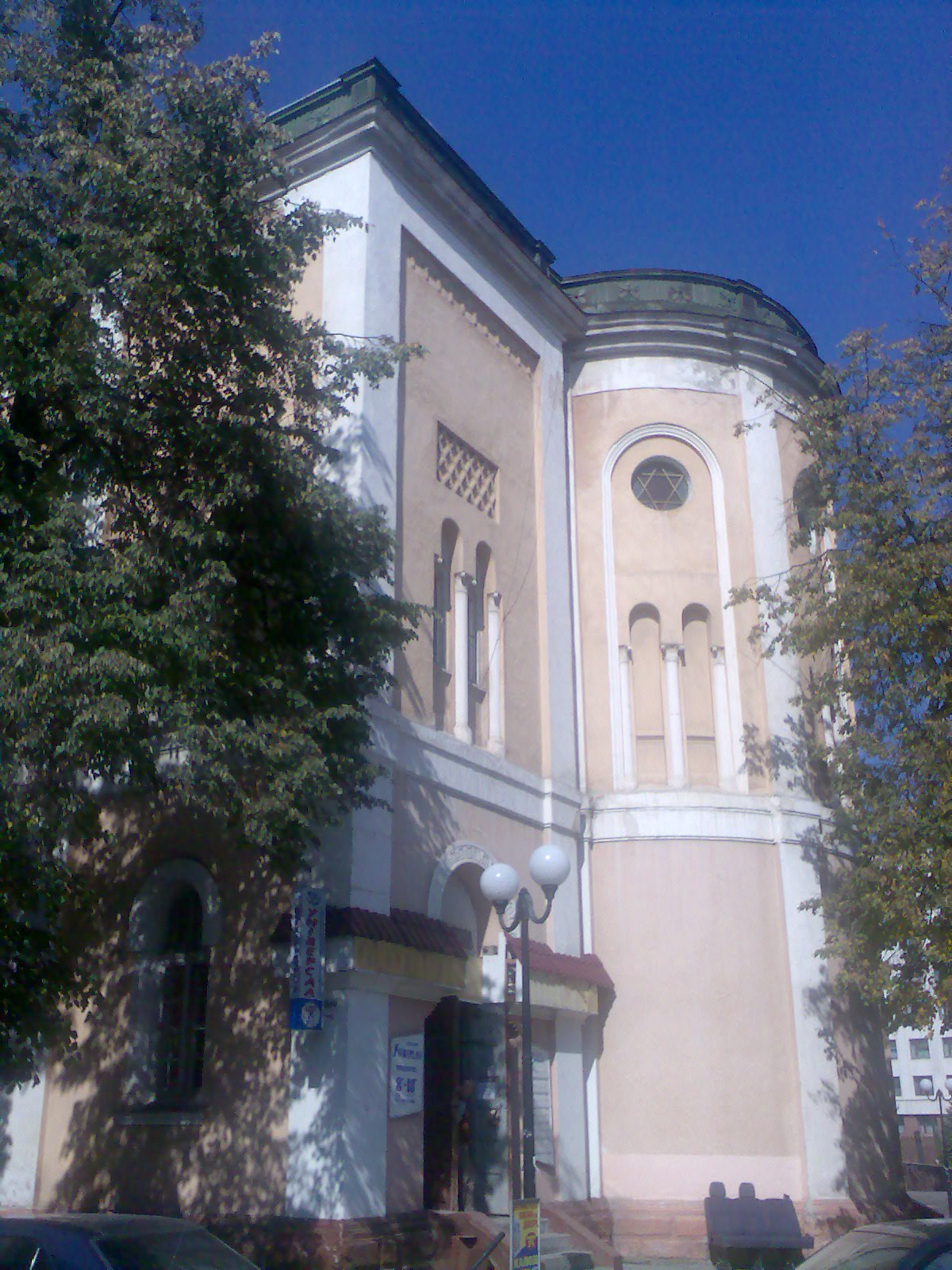 Синагога в Ивано-Франковске